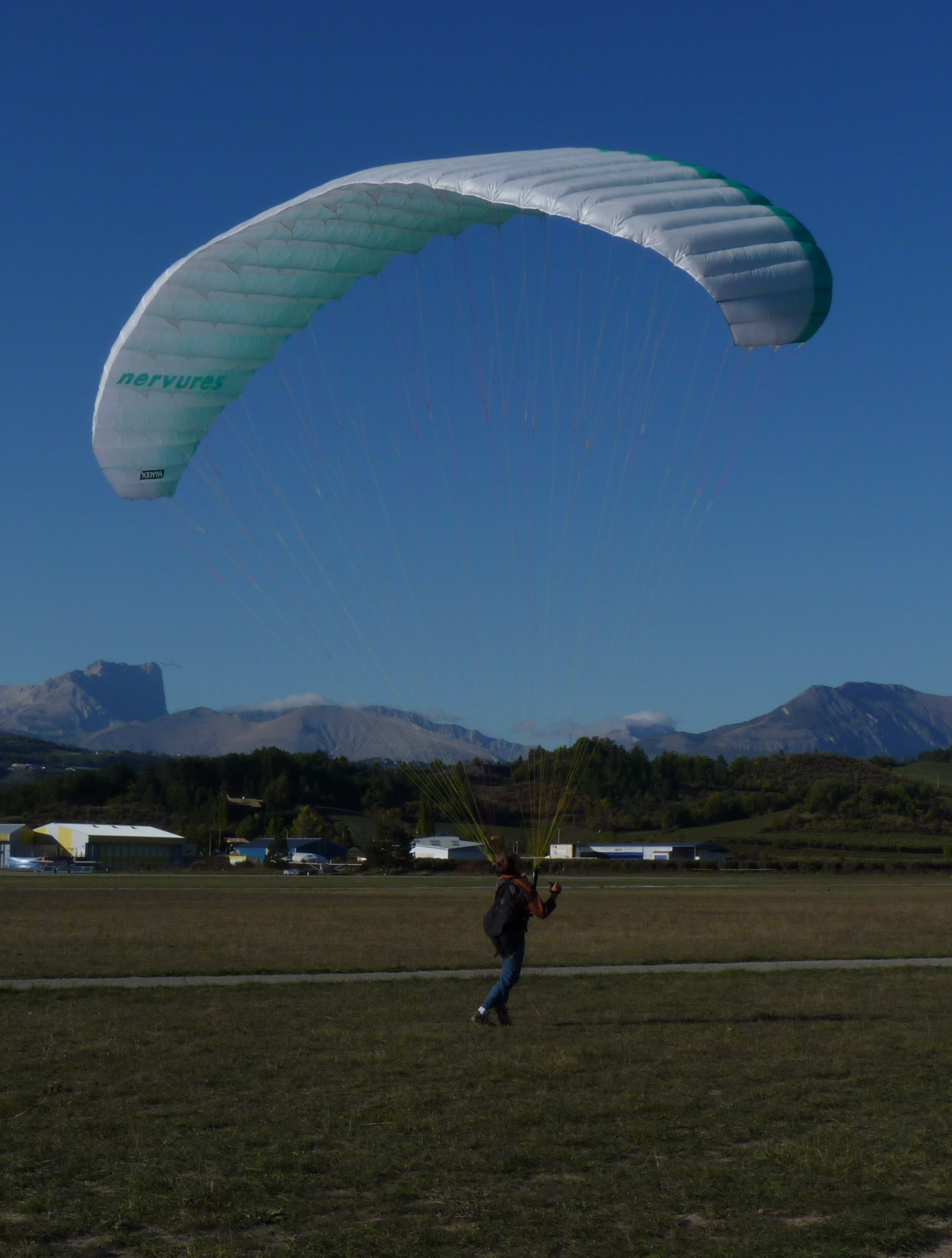 Parapente NERVURES modèle KENYA Sellette SUP'AIR Radical